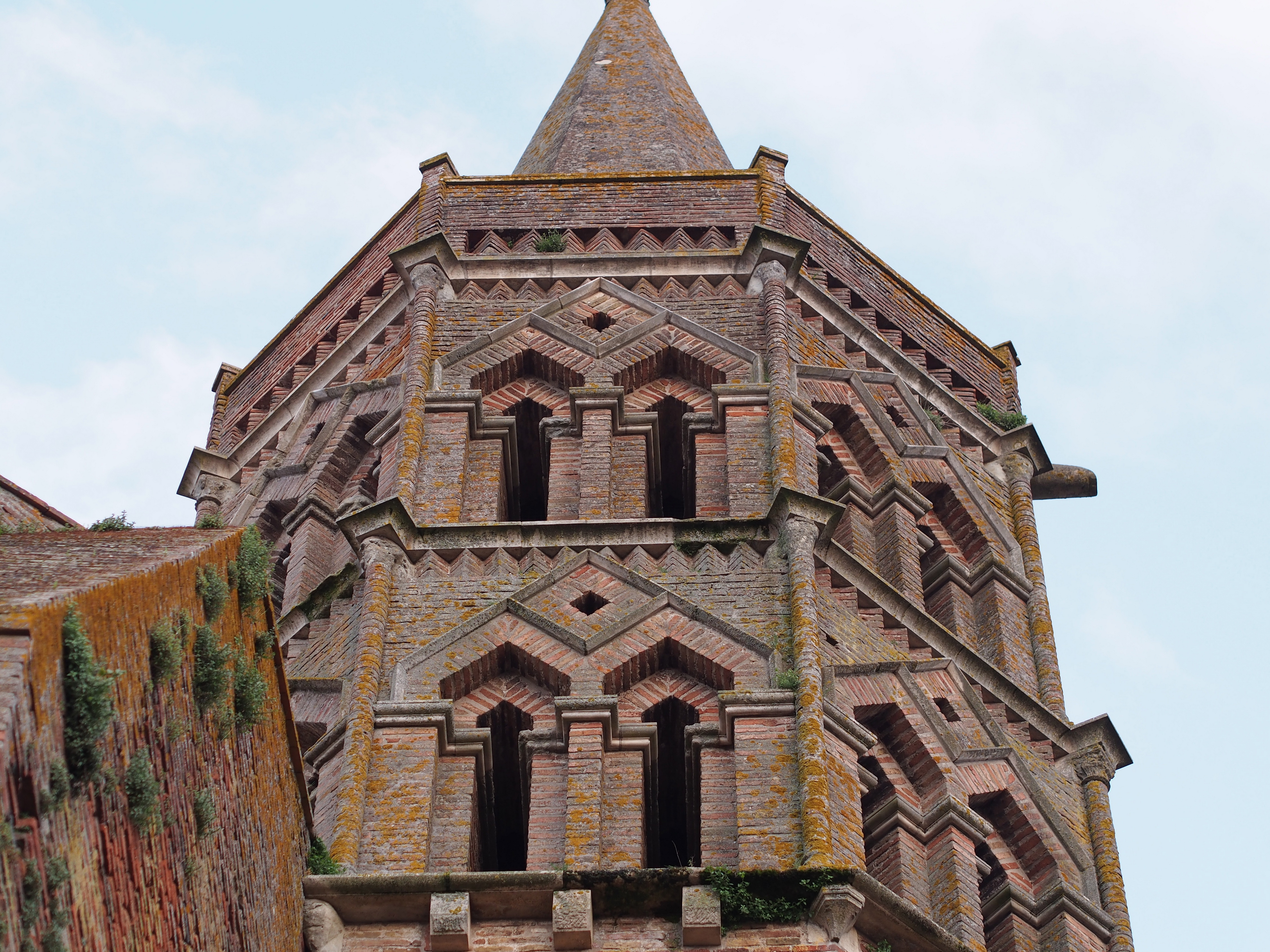 Église Notre-Dame de la Jonquière, à Lisle-sur-Tarn, France.